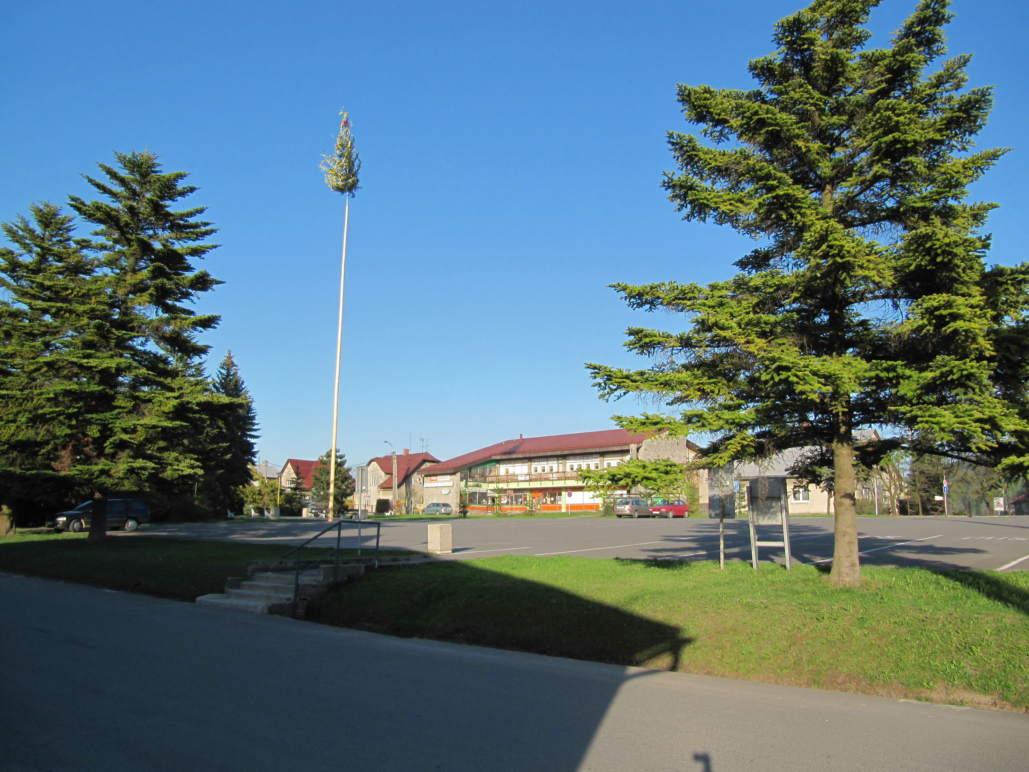 Hutisko